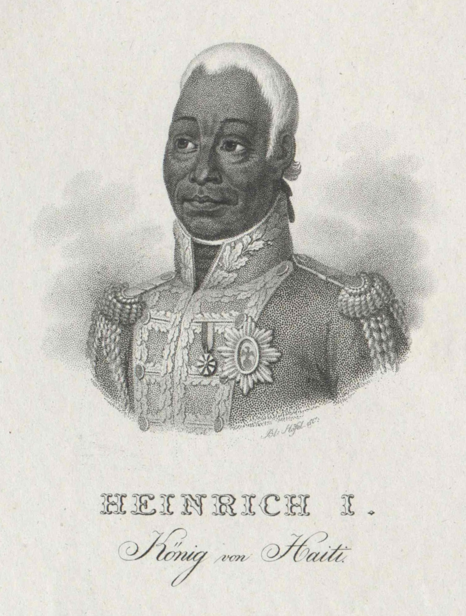 Heinrich I., König von Haiti, Seit 1807 Präsident von Haiti, seit 1811 König von Haiti. 1767-1820